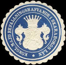 Sealing stamp Title: Kongl. Majts Befallningshafvande i Skaraborgs Län Description: blau, weiß, geprägt Place: size: 4 cm